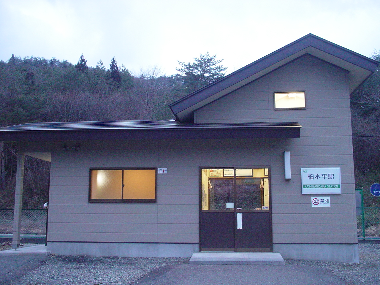 （柏木平駅）